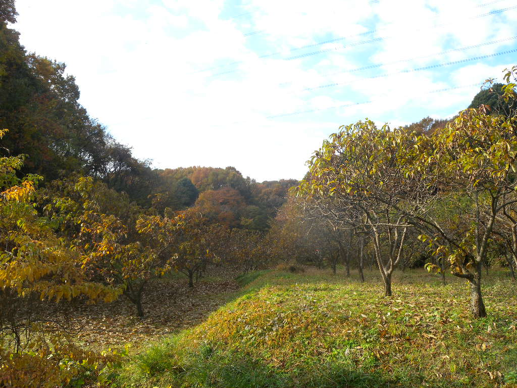 梨子ノ木特別緑地保全地区